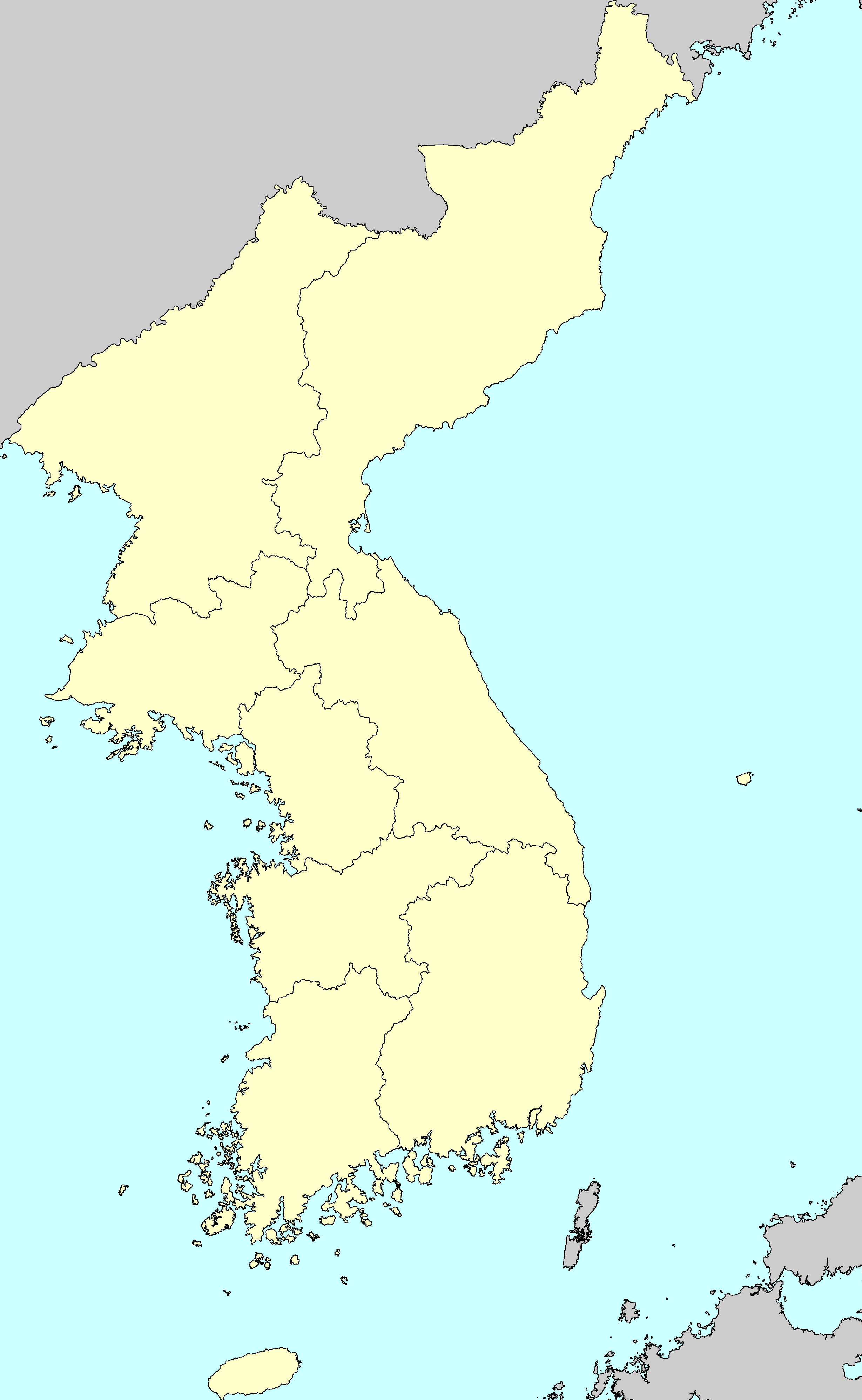 조선후기 행정구역